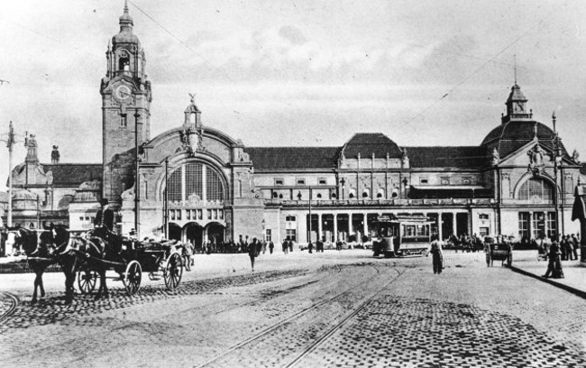 Wiesbaden főpályaudvara 1906-ban